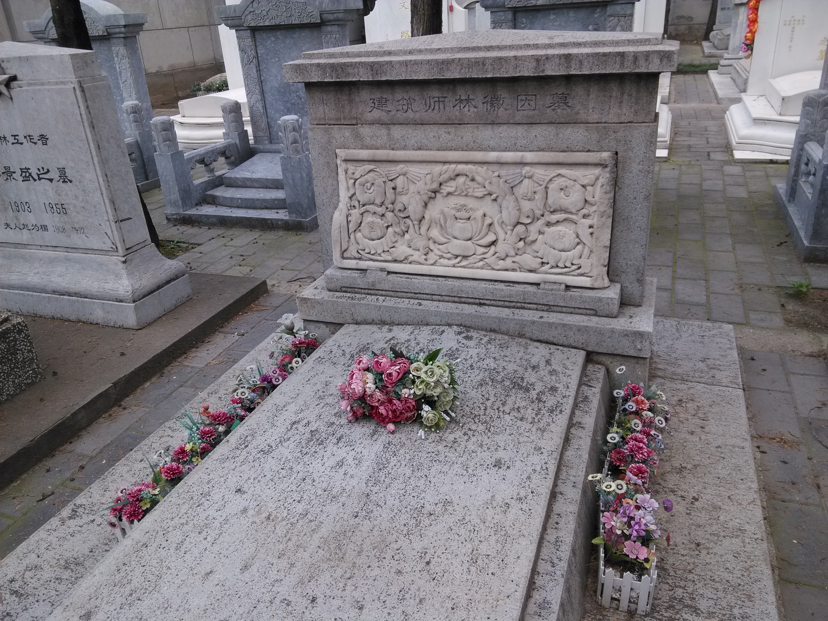 中文（中国大陆）: 建筑师林徽因墓，位于八宝山革命公墓二墓区。